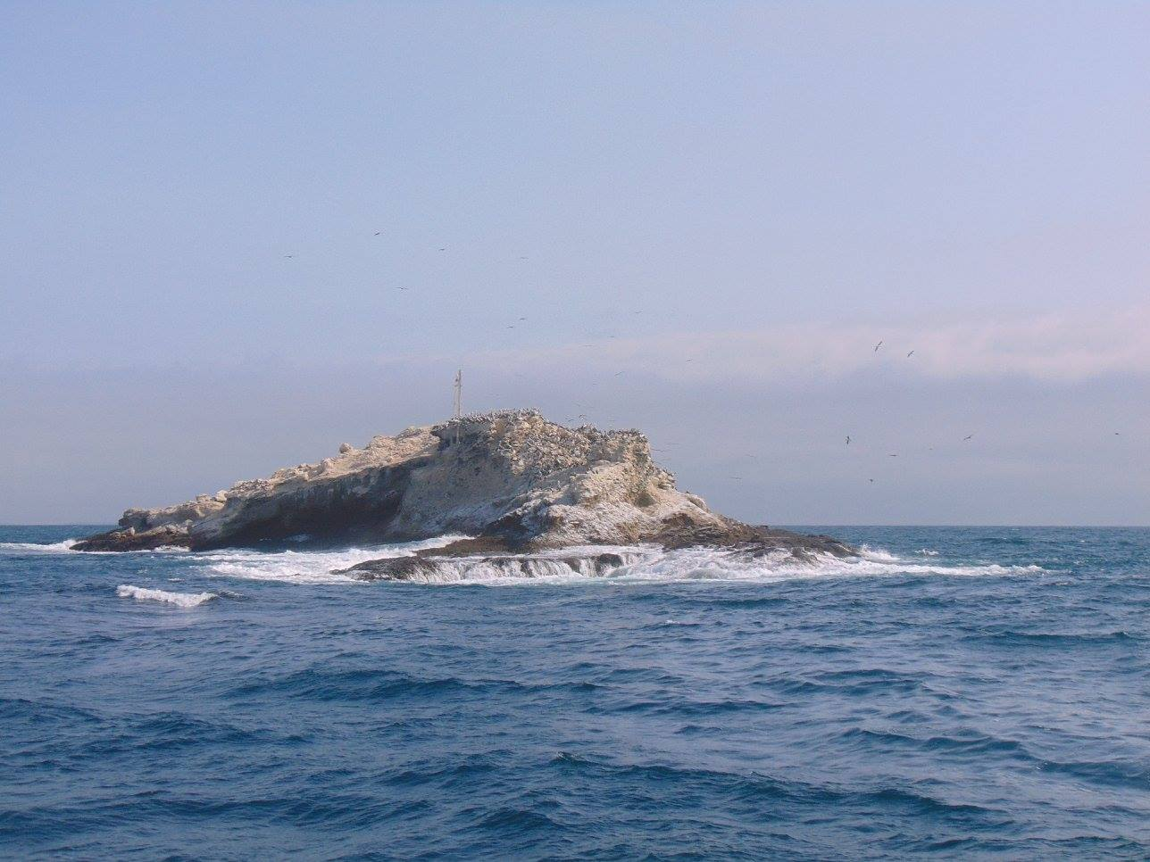 EL islote es uno de los puntos de buceo más visitado dentro de la REMAPE